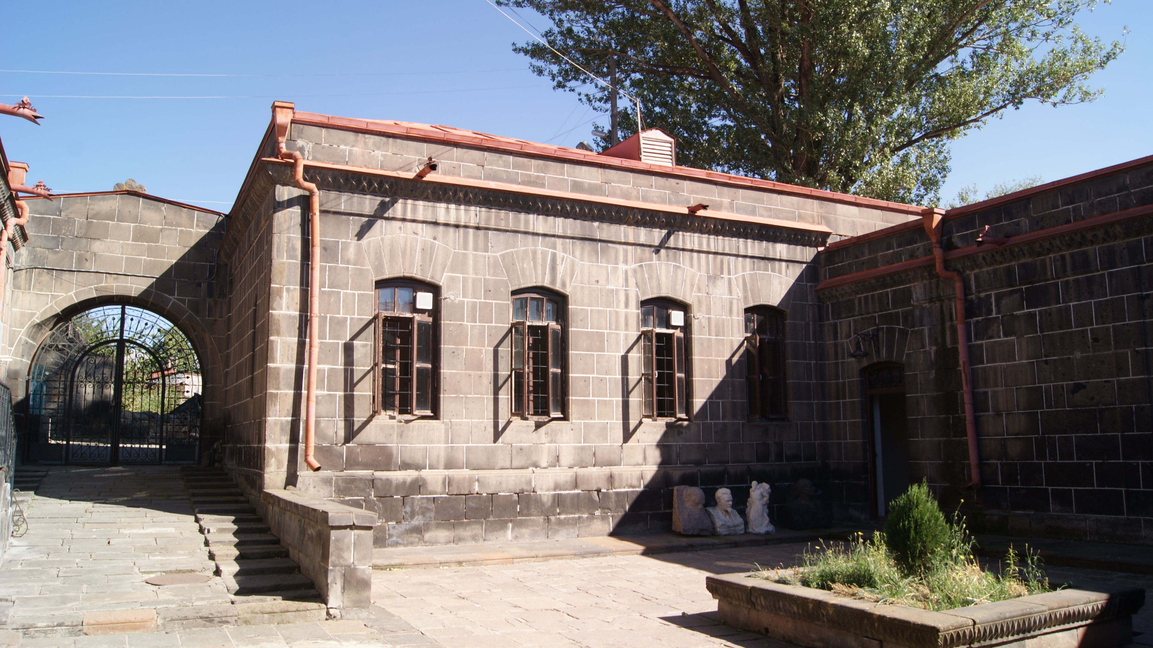 Մերկուրովի տուն թանգարան 1/4.954